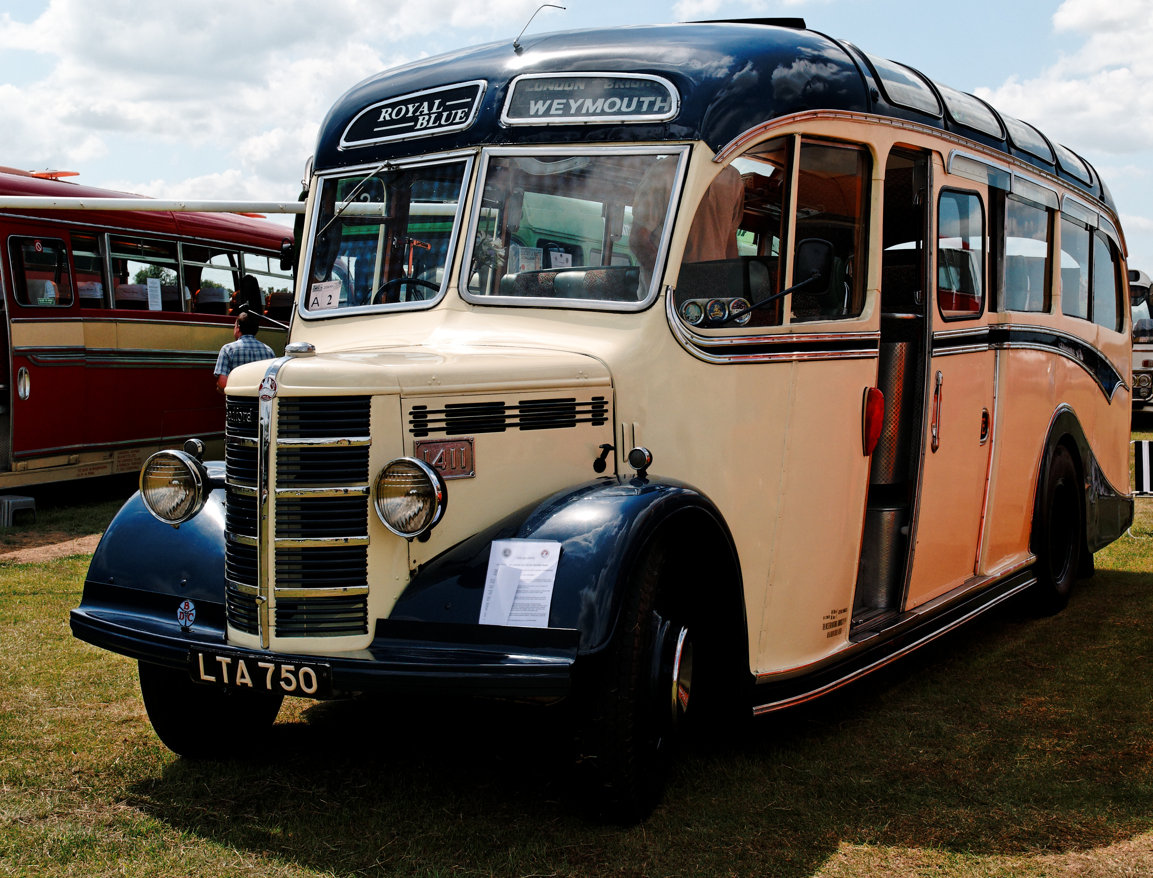 Bedford